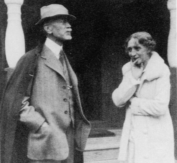 Arkitekt Isak Gustaf Clason (1856-1930) och hans hustru